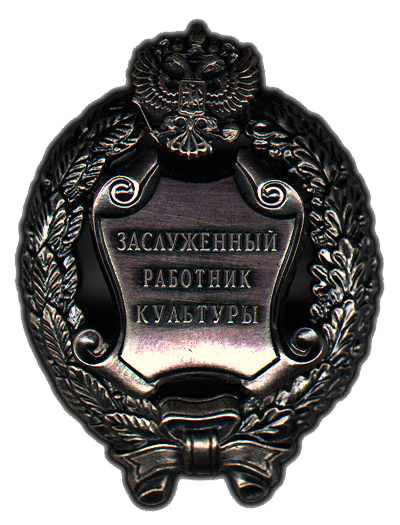 Заслуженный работник культуры Российской Федерации. Нагрудный знак.